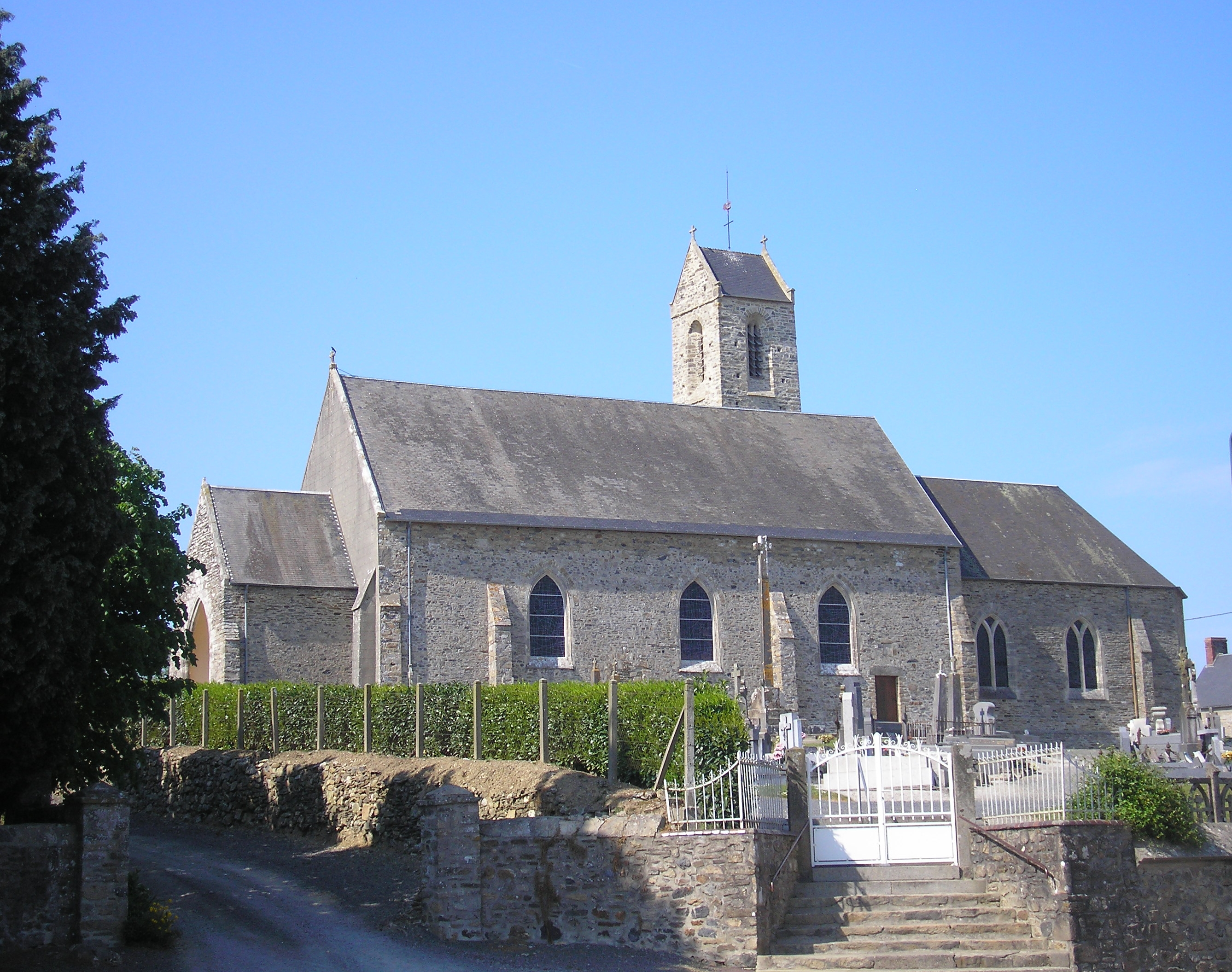 Le Lorey (Normandie, France). L'église Saint-Martin.